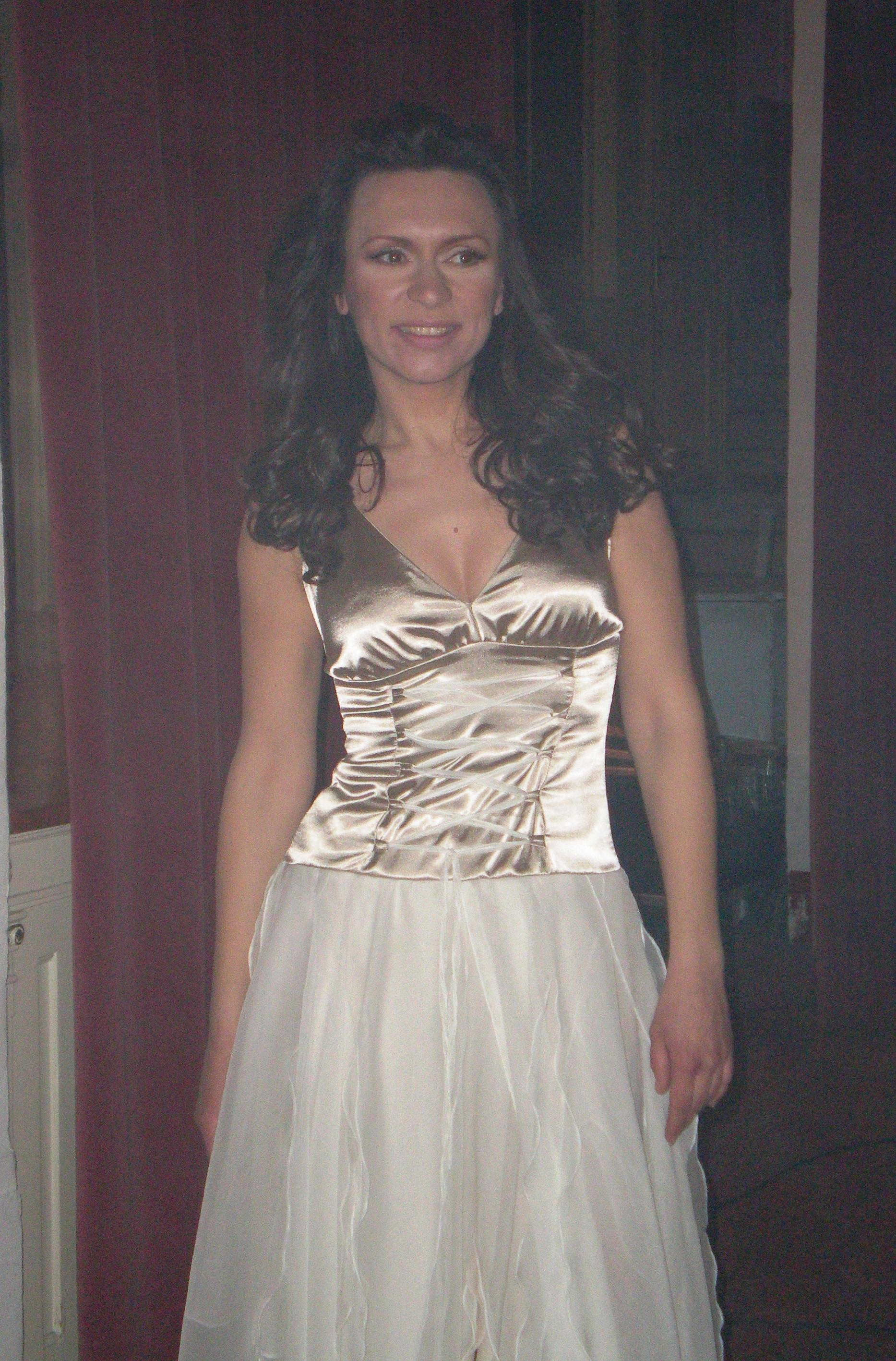 Croatian singer Emilija Kokić at Dora 2008.